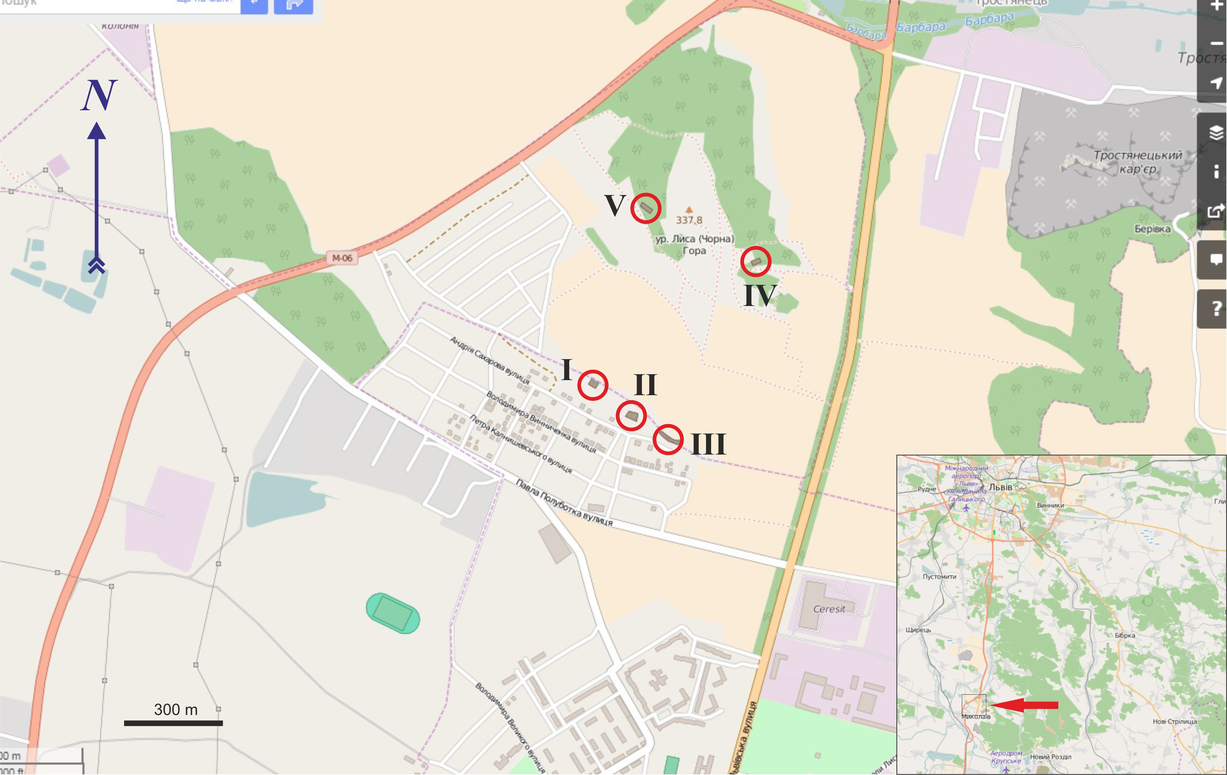 Фрагмент карти OSM урочища Чорна гора над Миколаєвом-Дністровським з археологічними памятками